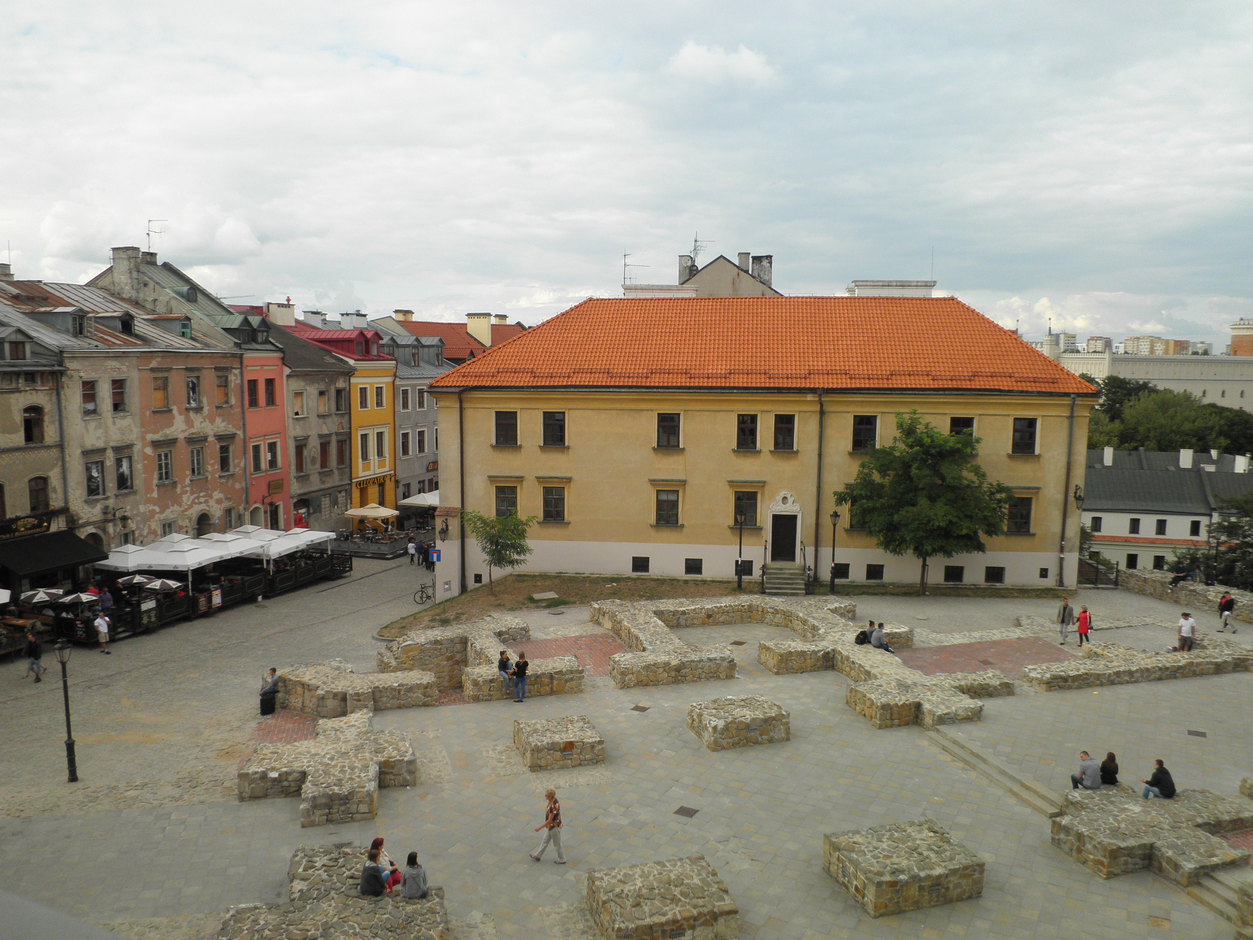 Plac po Farze i dawna plebania przy Grodzkiej 11 w Lublinie (nr rej.: A/273 z 31.03.1967) - widok z 2. piętra kamienicy przy Archidiakońskiej 6 (zdjęcie wykonane podczas wystawy POTY w Lublinie)